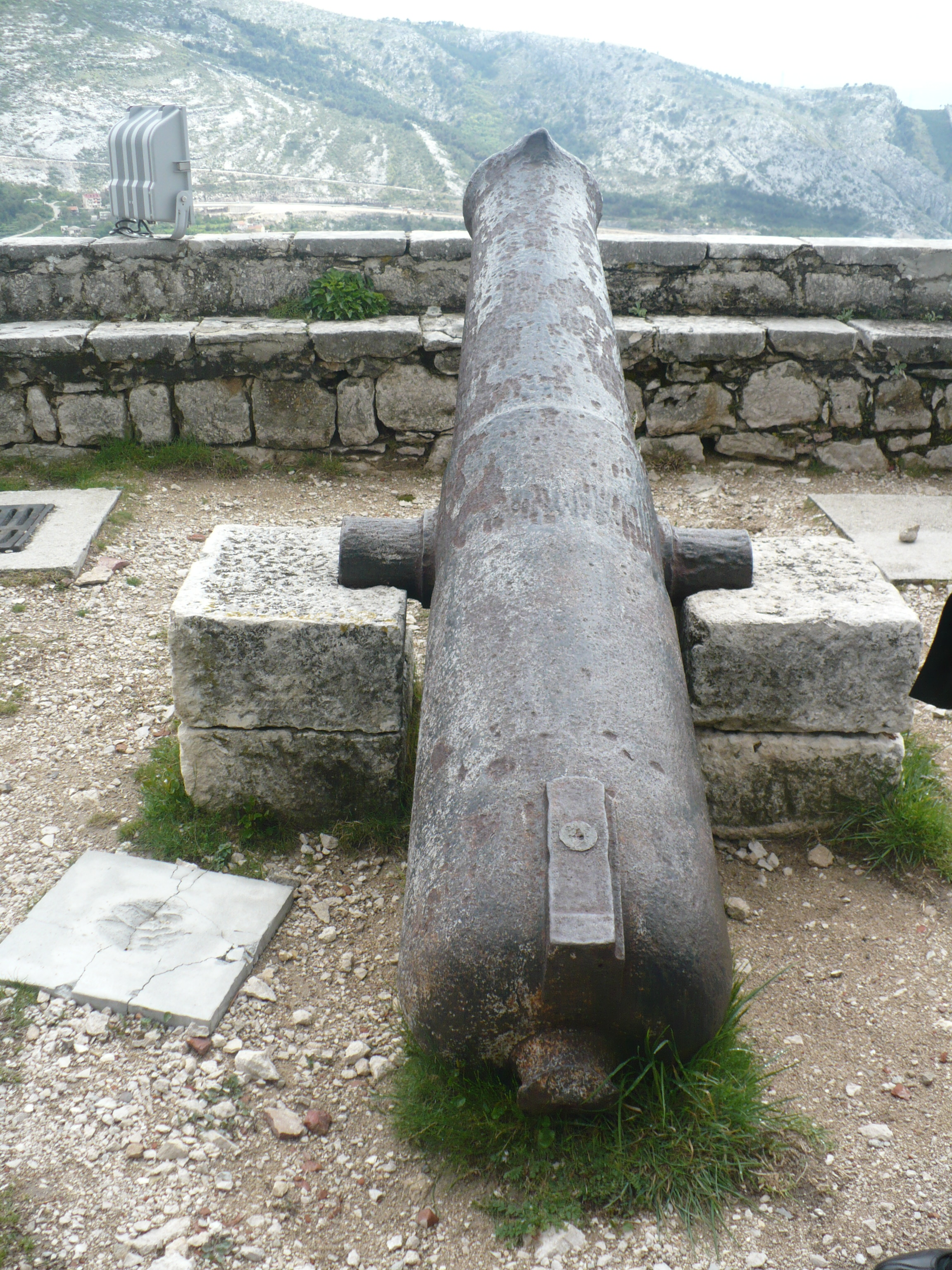 Klis Kalesi'nde kullanılan bir top